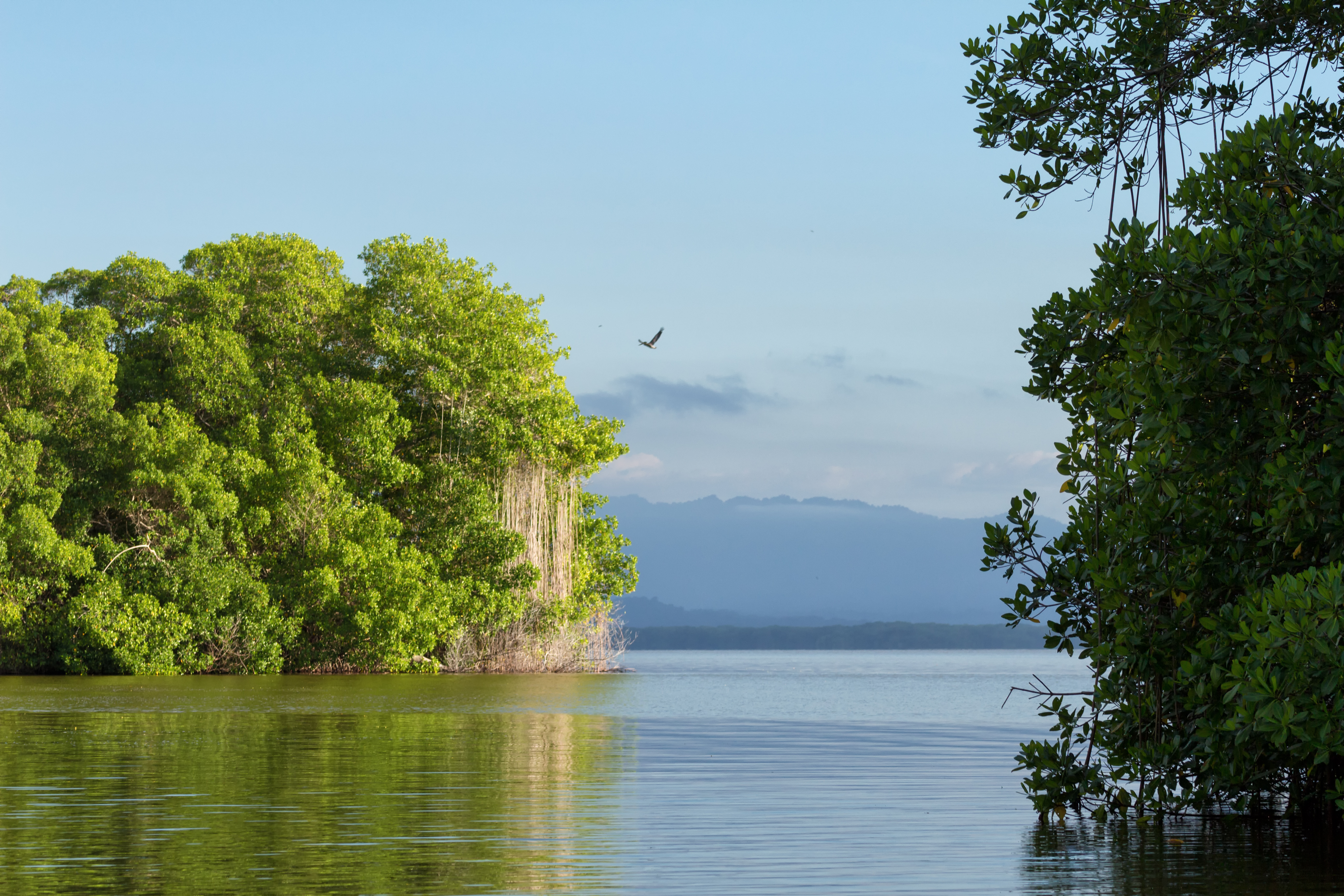 Tacarigua Lagoon National Park | Parque Nacional Laguna de Tacarigua